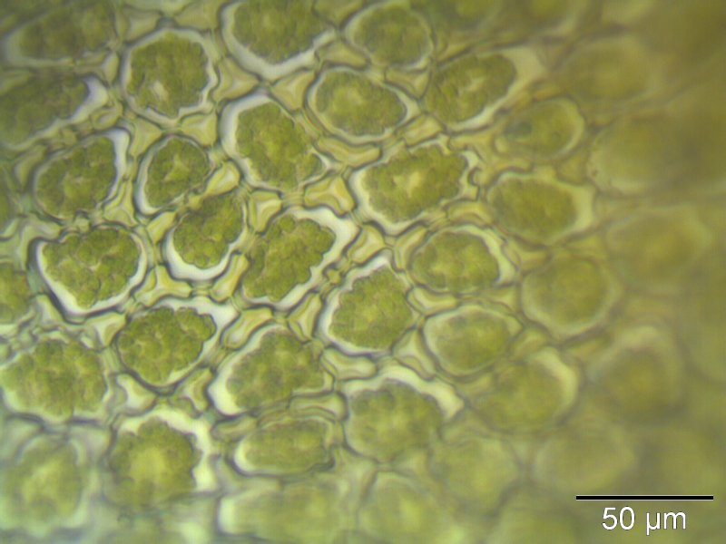 Behaartes Federchen-Lebermoos (Ptilidium ciliare), Laminazellen, Rostock